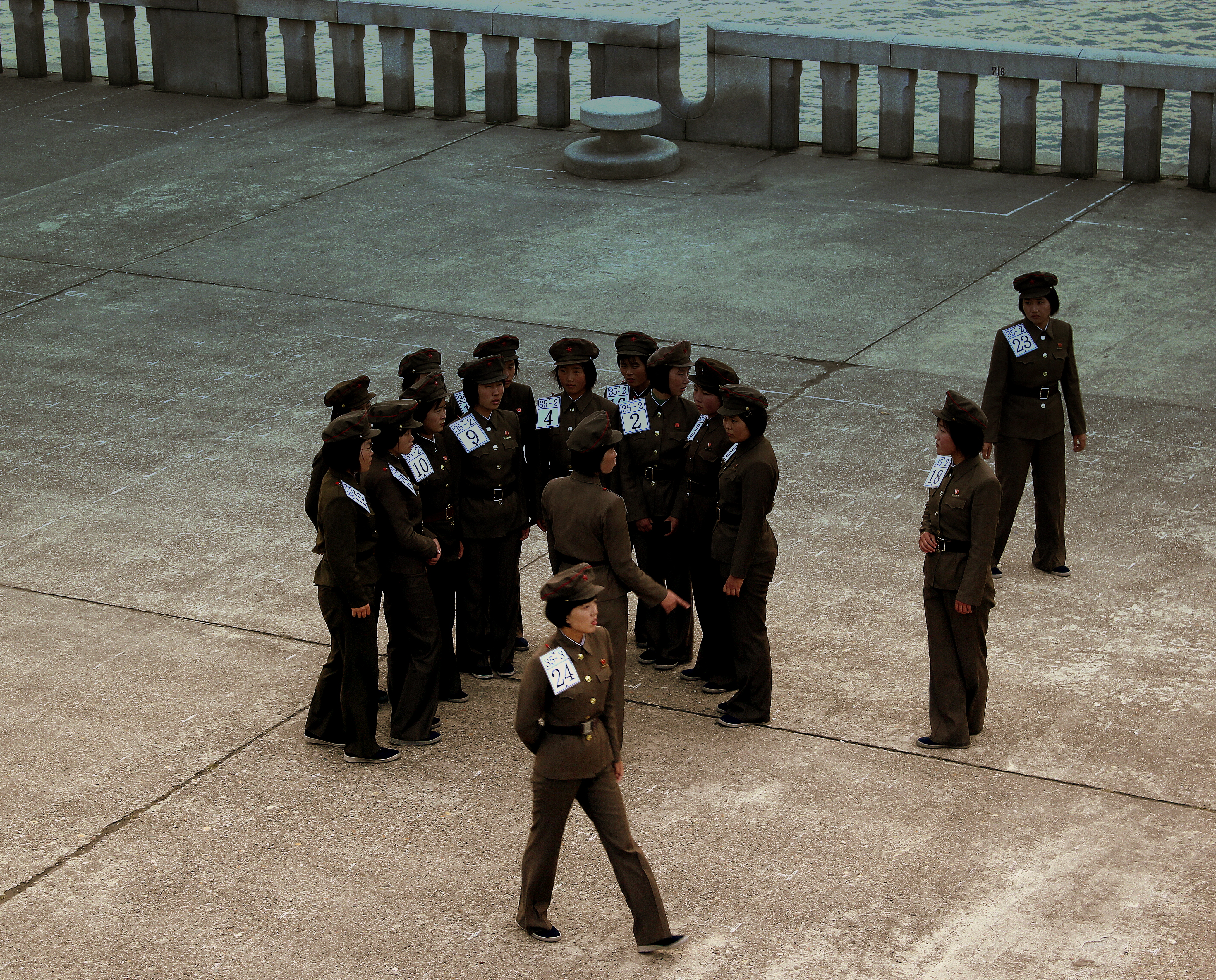 NORTH KOREA ARMY FEMALE RECRUITS MARCHING ON THE BANKS OF THE TAEDONGG RIVER PYONGYANG CITY DPRK NORTH KOREA OCT 2012